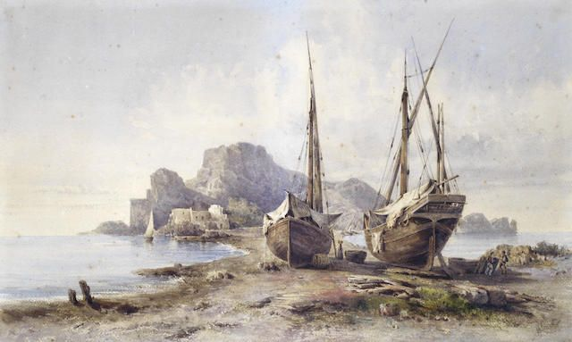 "Barche da pesca", acquerello, 70 x 51 cm., coll. privata